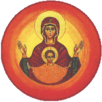 Logo de la Comunidad del Emmanuel